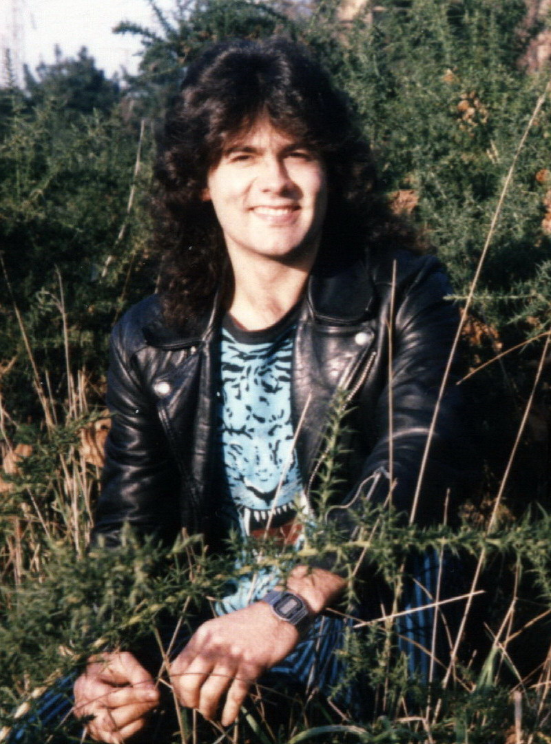 Santi Rubio en Lasarte 1986 -Angeles del Infierno